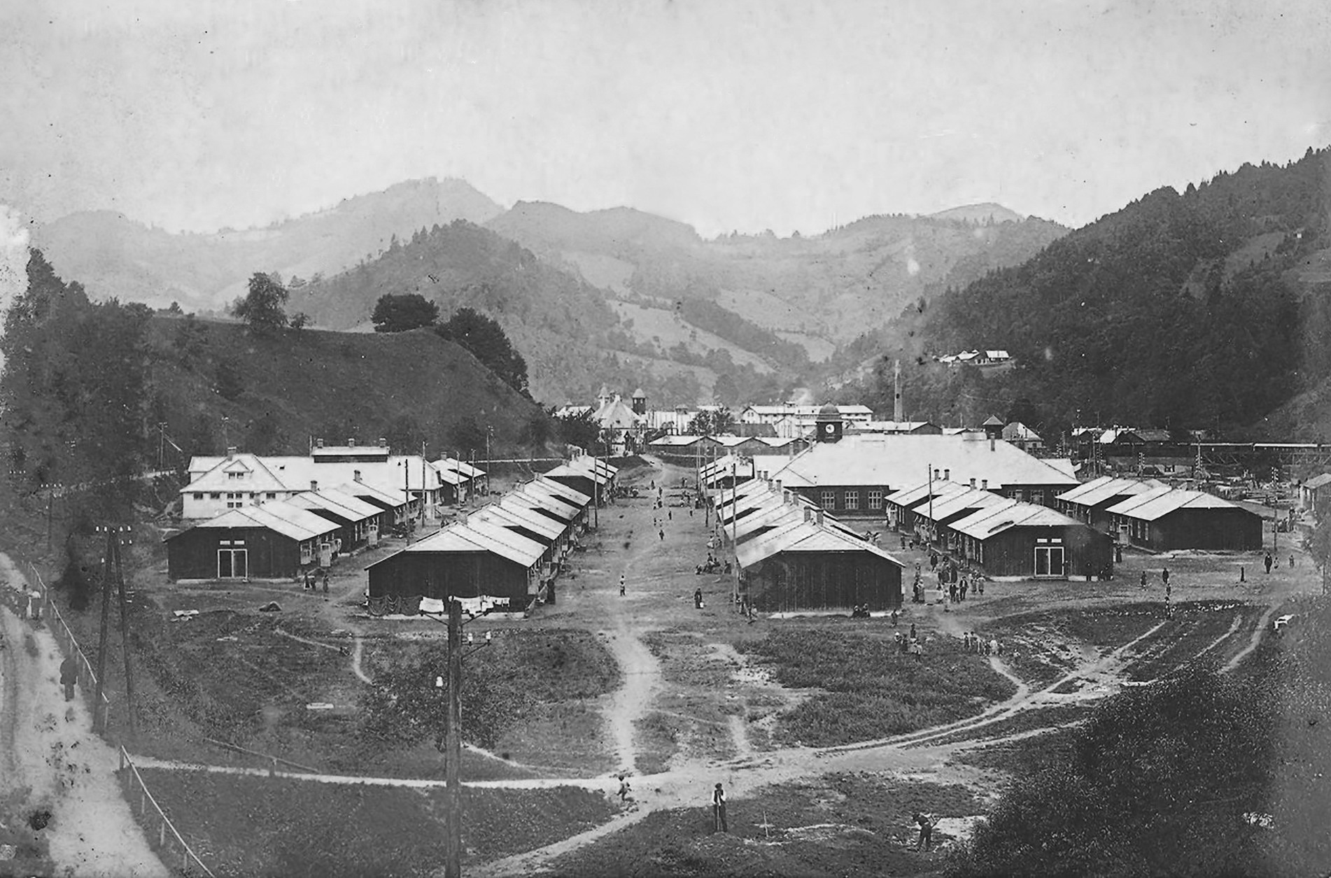 Begunsko taborišče Steinklamm je konec leta 1916 nudilo začasen dom približno 1.500 beguncem, predvsem s Krasa in iz spodnje Vipavske doline. Taborišče je imelo lastno električno centralo, pošto, prodajalno tobaka, trgovino, cerkev, vrtec, sirotišče, bolnišnice ter šolo, v kateri so učili begunski učitelji v slovenskem jeziku.